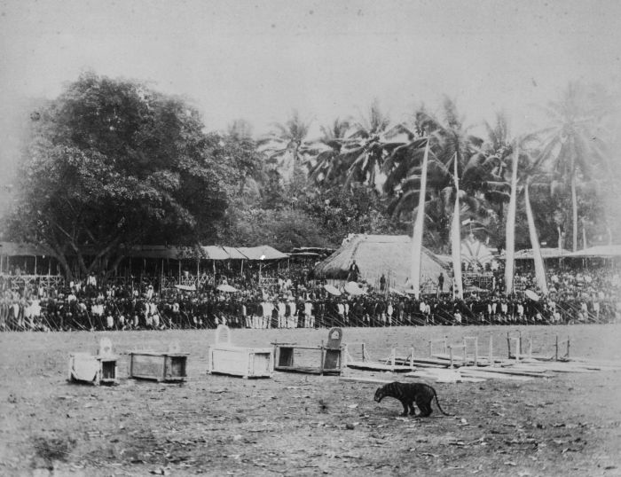 Foto. In de 19e eeuw waren er twee rituelen waar tijgers bij betrokken waren. Dat waren het tijger-buffelgevecht, waarbij de Midden-Javaanse vorsten een tijger en een waterbuffel (karbouw) tegen elkaar lieten vechten, wat meestal door de karbouw werd gewonnen, en de tijgerstekerij of tijgerrampok. Bij dat laatste ritueel, dat ook door Regenten georganiseerd werd, sloot men een aantal tijgers en luipaarden in een soort kisten. Vervolgens werden ze op een groot veld neergezet, omgeven door een carré van Javanen met pieken bewapend, drie rijen dik. Dan werd de tijger uit zijn kist gejaagd, waarna hij verwoede pogingen deed te ontsnappen, daarbij iedere keer op een muur van pieken stotend. In verreweg de meeste gevallen stierf de tijger aan de wonden die hij op die manier opliep, maar een enkele keer sprong hij over de rijen piekdragers heen en ontsnapte. (P. Boomgaard, 2001). Een tijgergevecht English (mechanical translation of above): In the 19th century there were two rituals where tigers were involved. Those were the tiger-buffalo fight, which the Central Javanese princes a tiger and a water buffalo (carabao) were fighting against each other, usually by the buffalo was won, and tijgerstekerij or tijgerrampok. This last ritual that was organized by the Regents, they closed a few tigers and leopards in a kind of boxes. They were then put down on a large field surrounded by a square of Javanese armed with spikes, three rows deep. Then the tiger was hunted from his chest, whereupon he were trying to escape, taking each time a wall of peaks butt. In most cases the tiger died of the wounds he thus rose, but occasionally he jumped over the rows carriers peak back and escaped. (P. Orchard, 2001). A tiger fight